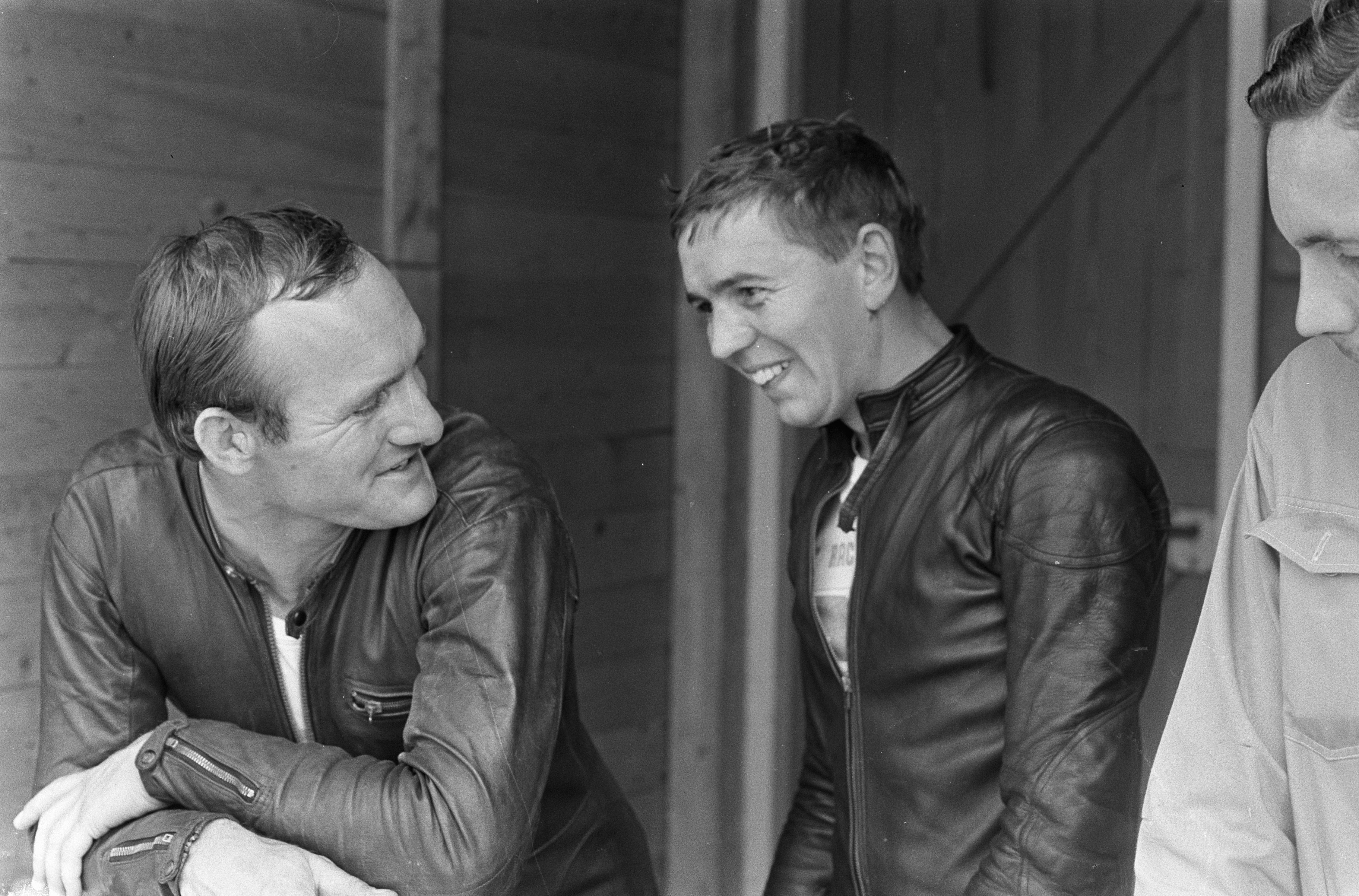 Collectie / Archief : Fotocollectie Anefo Reportage / Serie : TT Assen 1966 Beschrijving : TT te Assen, training, Mike Hailwood en Ralph Bryans Datum : 22 juni 1966 Locatie : Assen Trefwoorden : coureurs, motorsport, trainingen Persoonsnaam : Bryans, Ralph, Hailwood, Mike Fotograaf : Kroon, Ron / Anefo Auteursrechthebbende : Nationaal Archief Materiaalsoort : Negatief (zwart/wit) Nummer archiefinventaris : bekijk toegang 2.24.01.05 Bestanddeelnummer : 919-2787